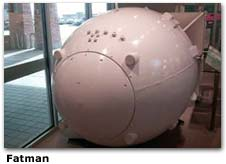 Modell der Fat-Man Bombe.